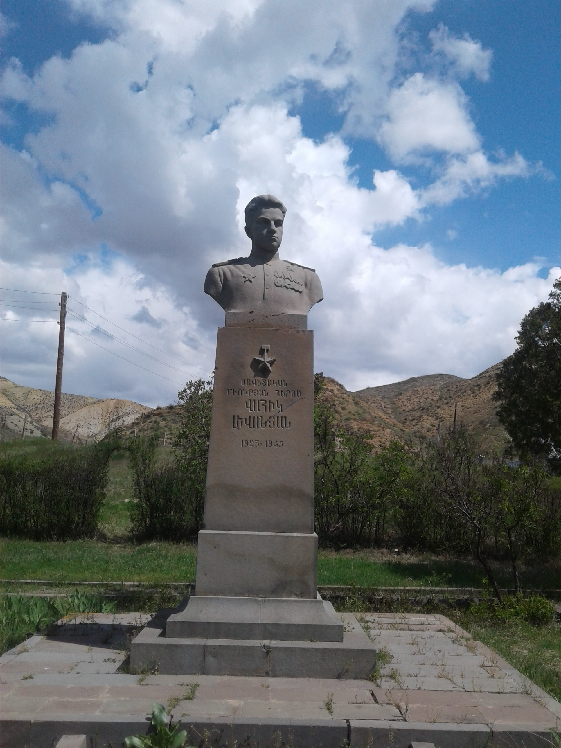 Վահիկ Լևոնյանի կիսանդրի 12/3